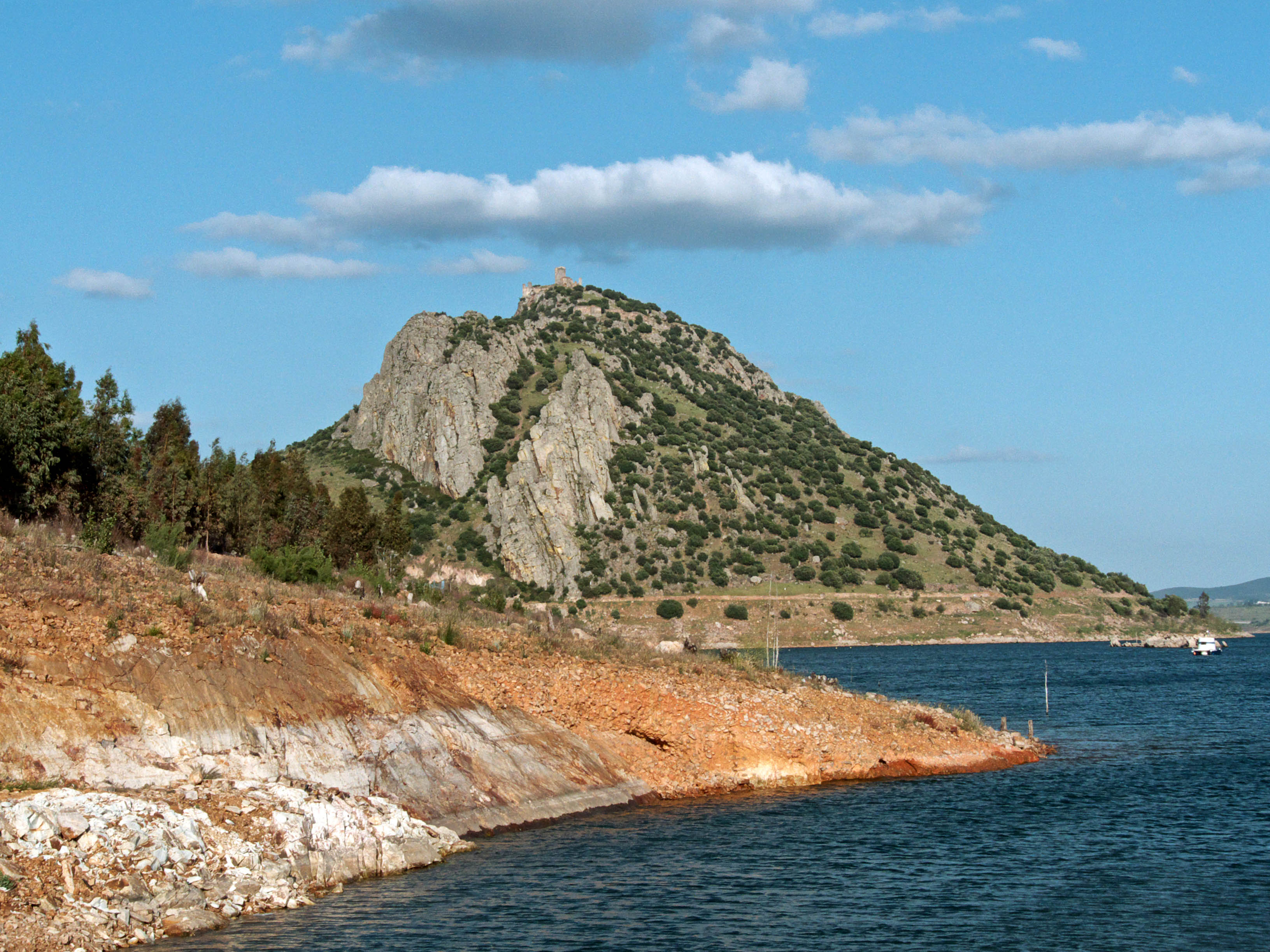 Embalse y Castillo de Alange, en La Serena de Badajoz This is a photography of a Special Area of Conservation in Spain with the ID: ES4310010. Natura2000 entry, EEA entry